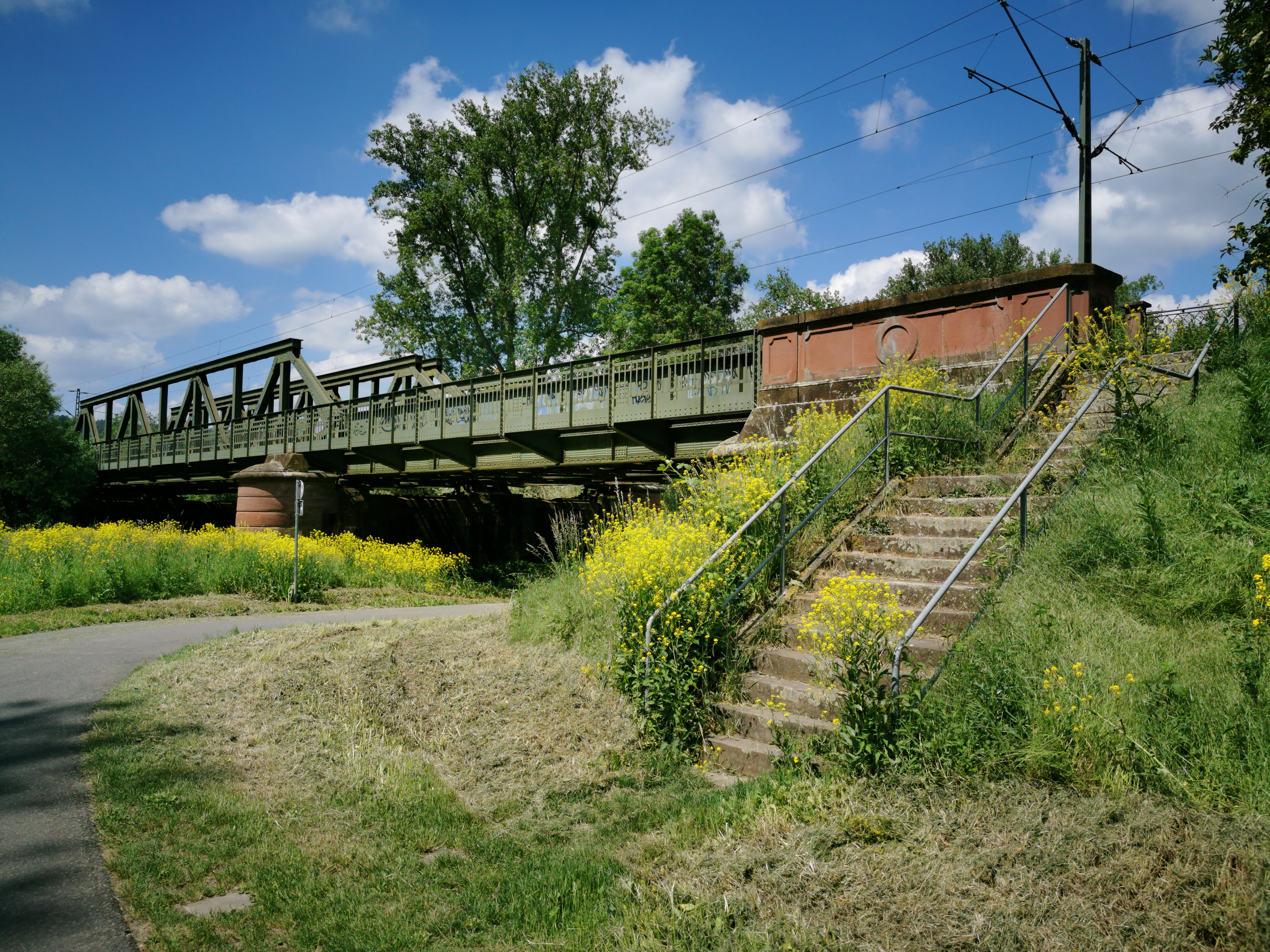 Die Eisenbahnbrücke Lauda ist eine Eisenbahnbrücke der Frankenbahn über die Tauber und über den Taubertalradweg auf den Gemarkungen der Stadtteile Lauda und Gerlachsheim der Stadt Lauda-Königshofen im Main-Tauber-Kreis in Baden-Württemberg. Der westliche Brückenteil liegt auf der Gemarkung von Lauda und der östliche Brückenteil auf der Gemarkung von Gerlachsheim der Stadt Lauda-Königshofen.